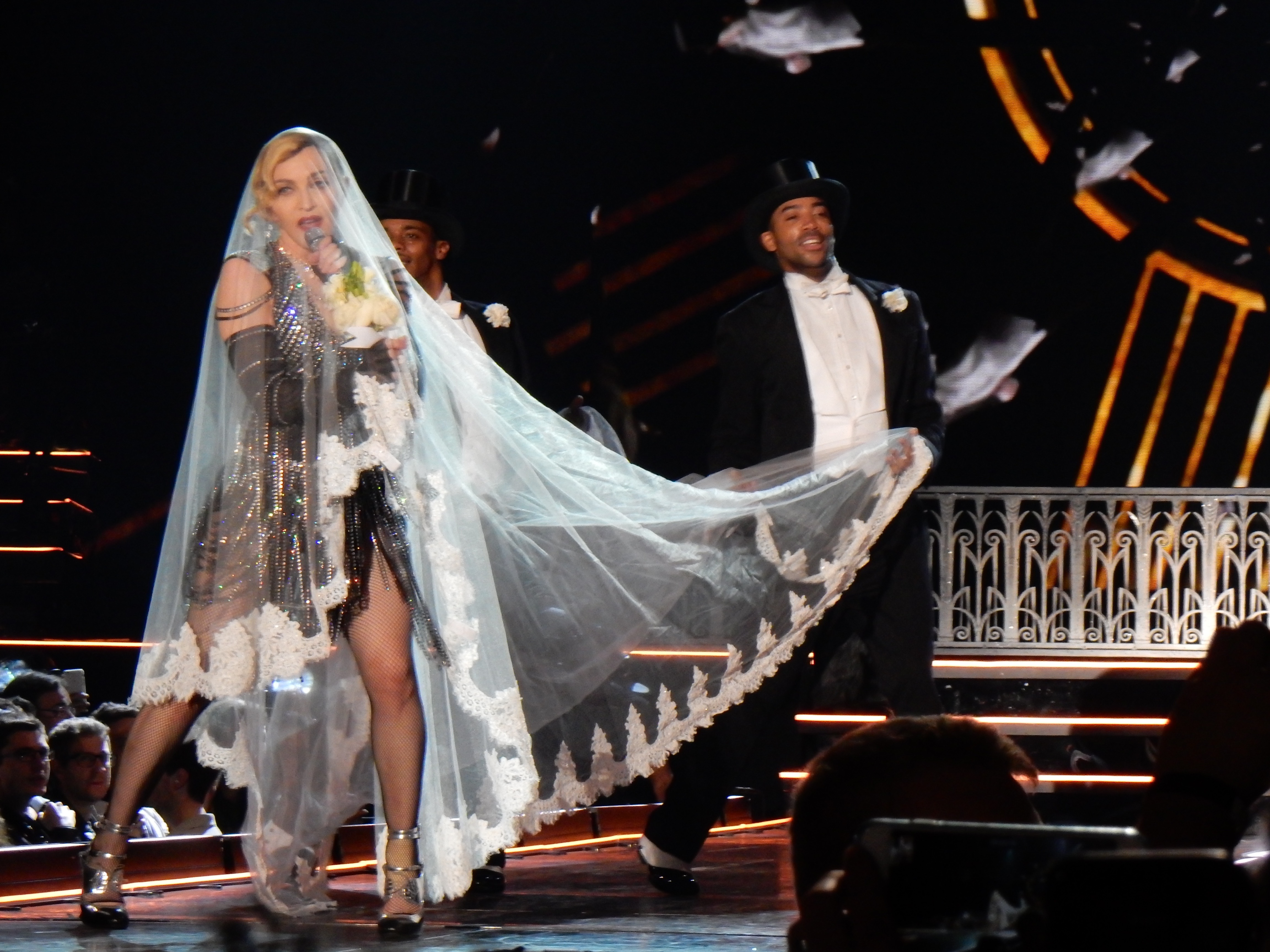 Madonna - Rebel Heart Tour Cologne 2